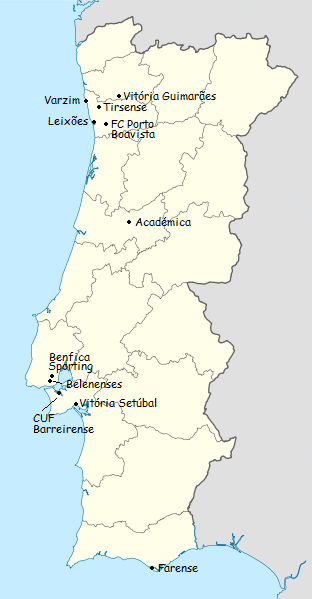 Carta dos clubes participantes do campeonato de portugal de futebol de primeira divisao 1970-1971